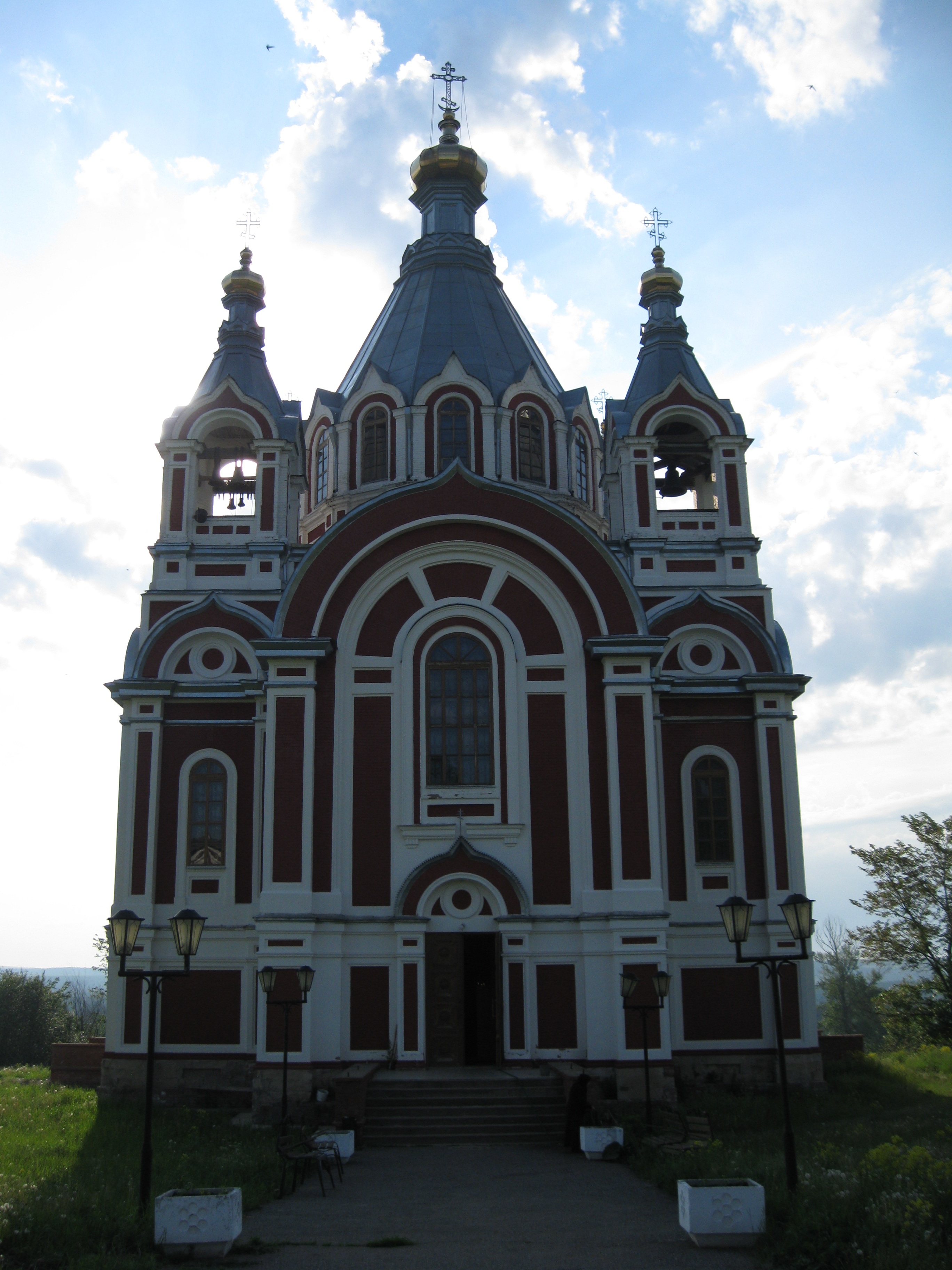 Свято-Никольский храм 1860 года, Свято-Никольский женский монастырь, село Николаевск, Чернушинский район, Пермский край